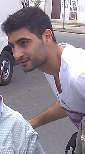 Mehmet Ekici gibt Autogramme, nach dem Mannschaftstraining von Werder Bremen am Weserstadion